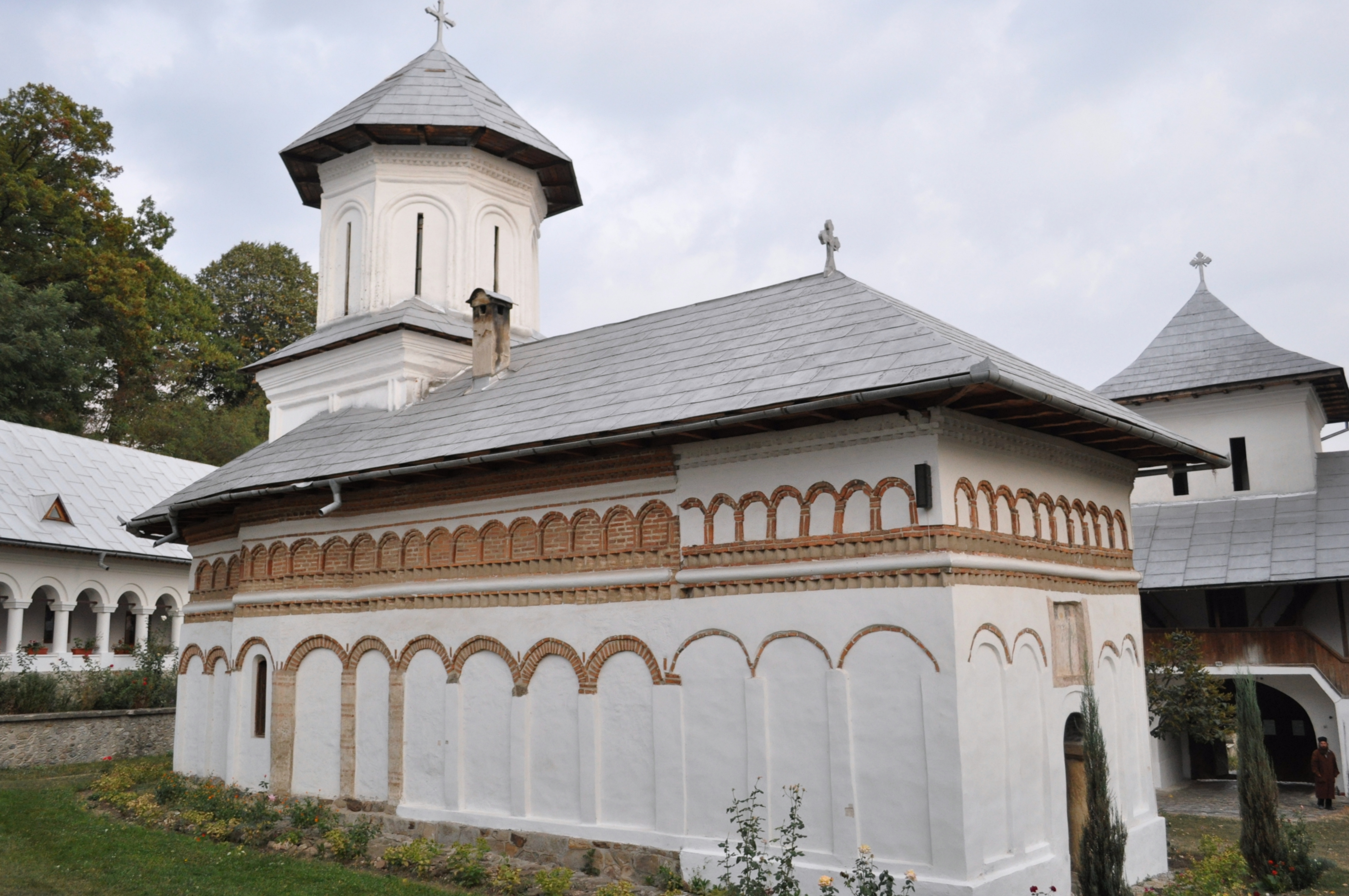 Ansamblul schitului Crasna, județul Gorj